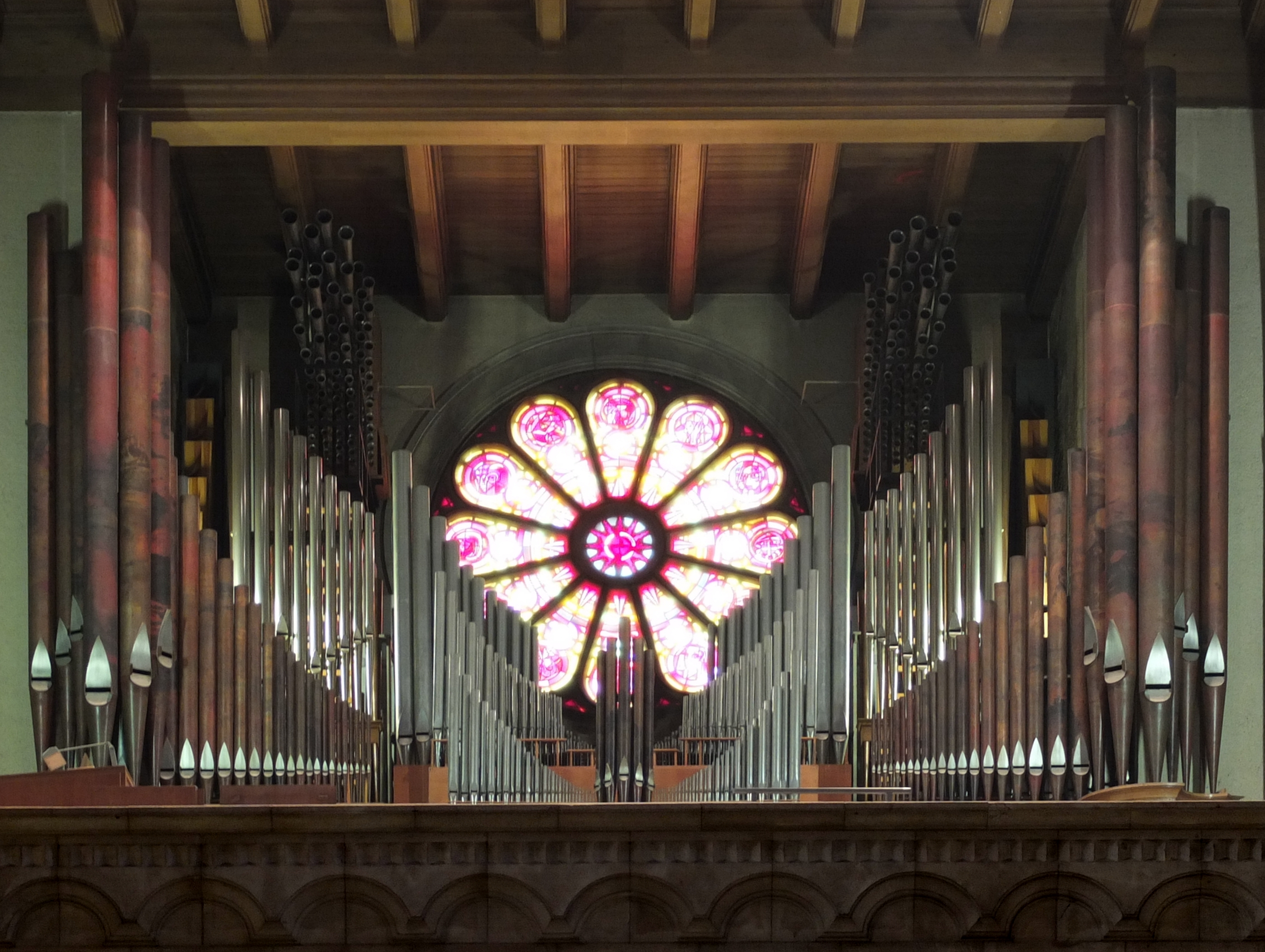 Klais-Orgel in der St. Willibrord Basilika, Echternach/Luxemburg